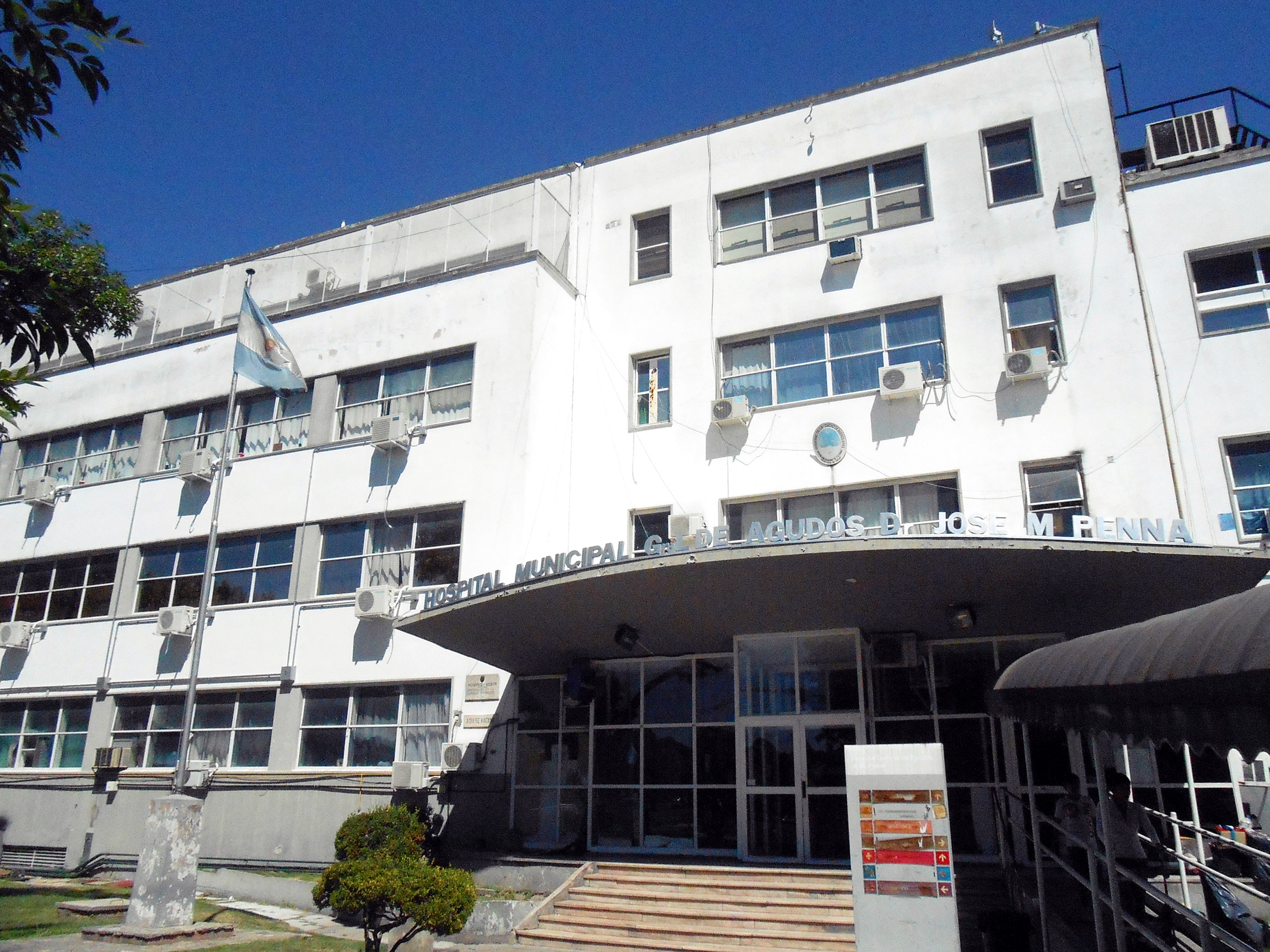 Hospital Penna - Buenos Aires - Argentina